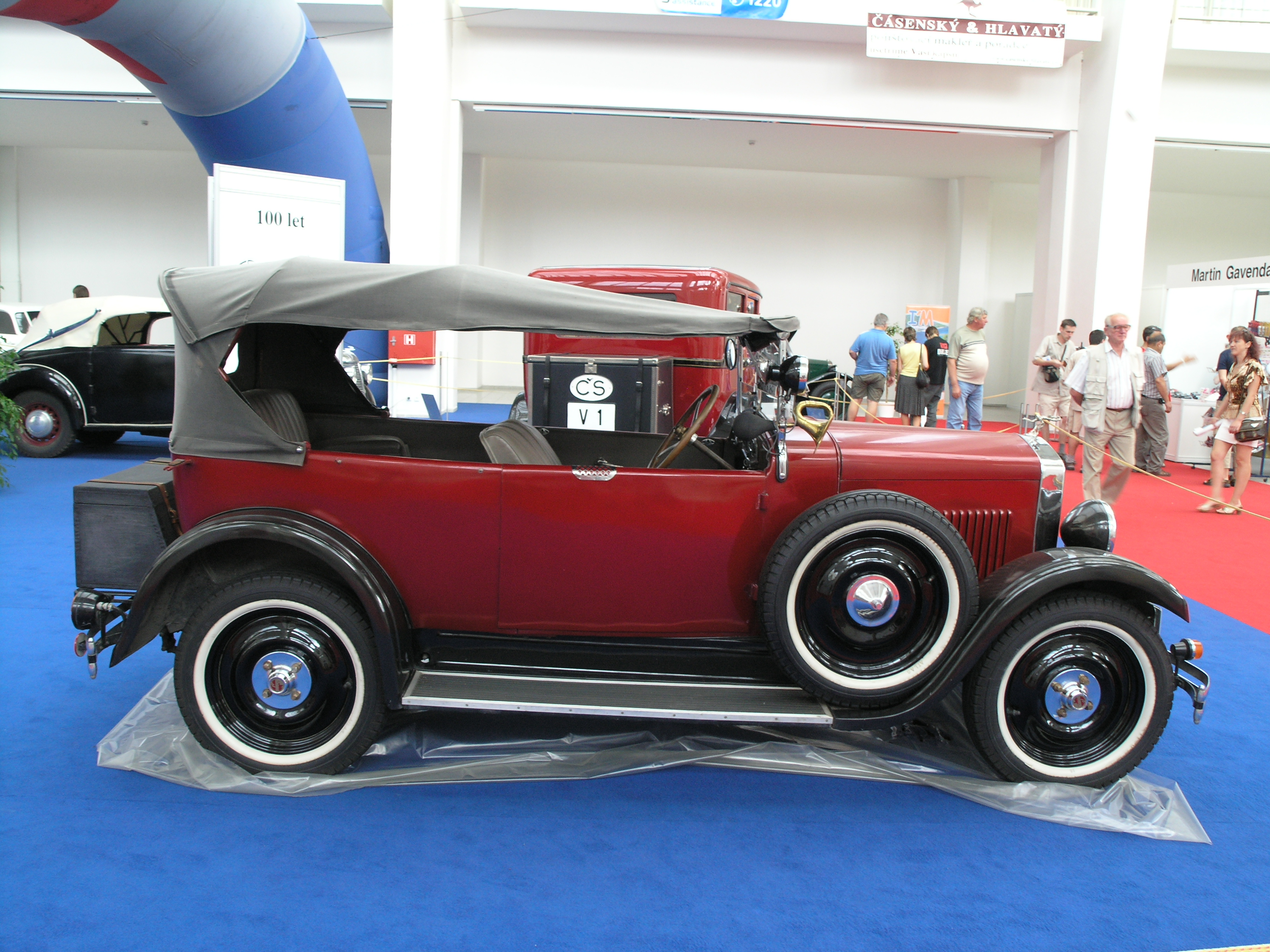 Vůz Praga Piccolo (1931) na výstavě Dědeček automobil v rámci Autosalónu v Brně, v roce 2007